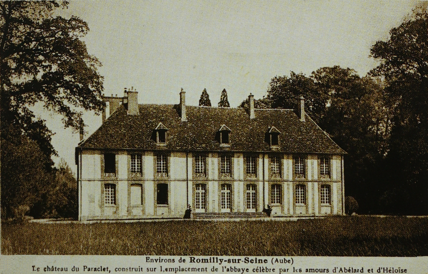 vue du paraclet